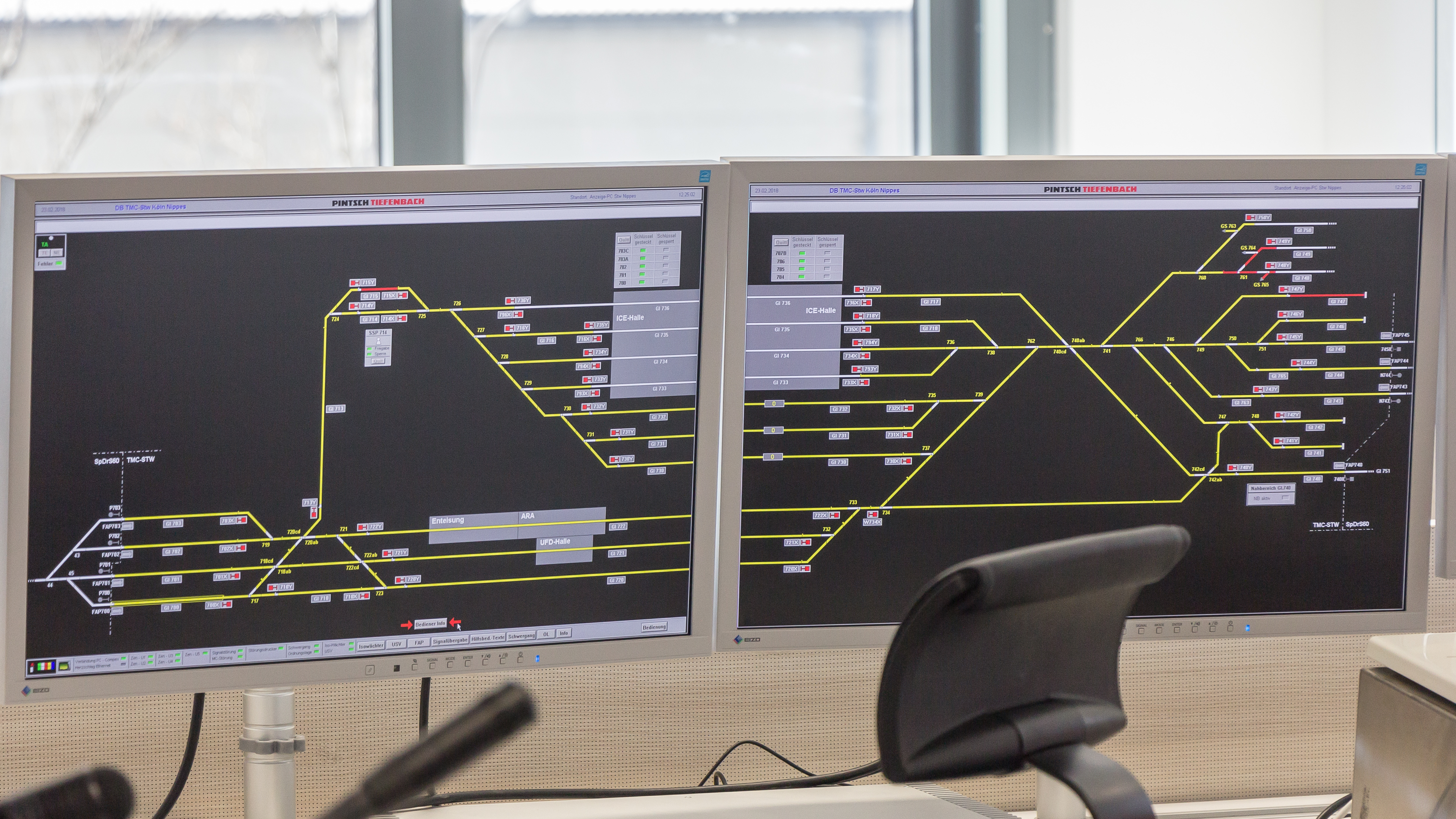 Besichtigung ICE-Instandhaltungswerk Köln-Nippes Februar 2018 Foto: Verwaltung, Arbeitsplatz des Disponenten mit Anzeige-PC des TMC-Stellwerkes Köln-Nippes